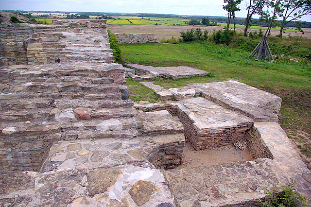 Lihula väravaehitiste konserveeritud müürijäänused.